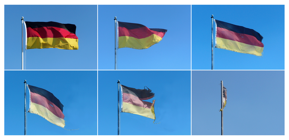 Deutschlandflagge (physikalisch) Bildfolge (Fotografie), Gesellschaftskritik, Foto Andreas Paeslack